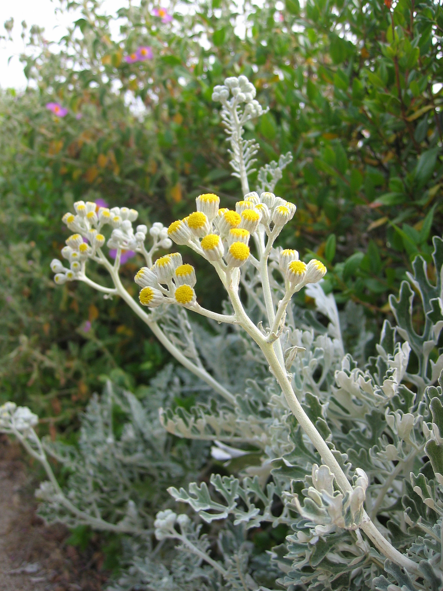 Senecio_cineraria, Calvi, Corse